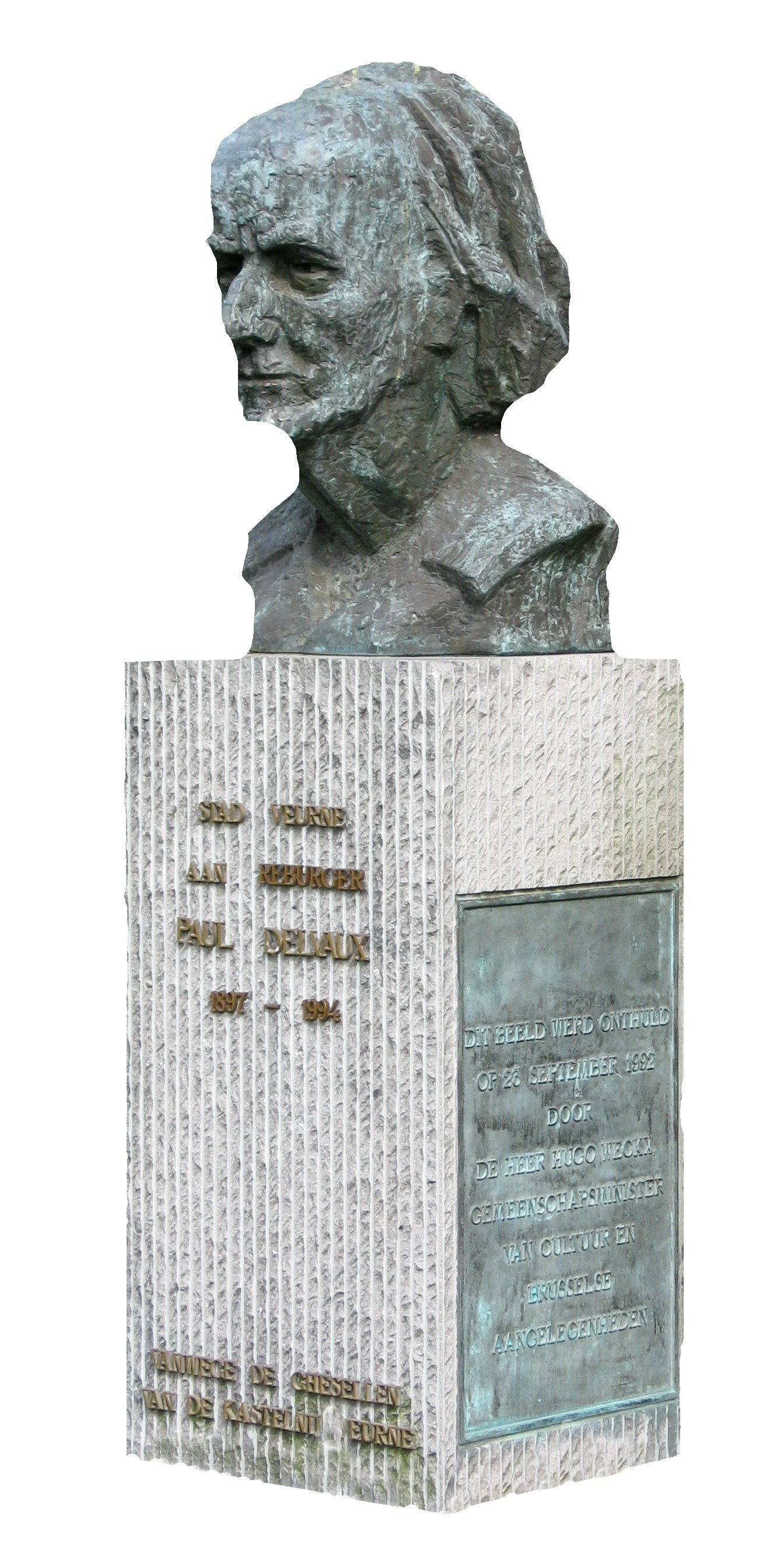 Paul Delvaux in Veurne